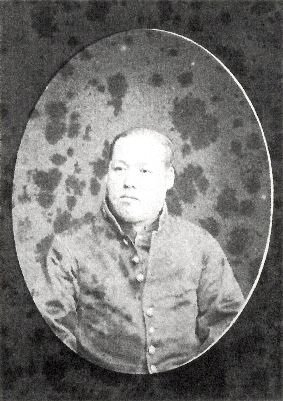 片桐貞篤の肖像写真。